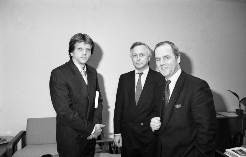 Der "Deutsche Kulturpreis 1988" wurde am 11. März 1989 in München an Adalberto Eberhard (Brasilien) verliehen. Eberhard war stellvertetender Umweltminister des Staates Mato Grosso und Mitbegründer der FEMA, einer staatlichen Institution zum Schutz der Regenwälder. 17.3.1989 Besuch im Büro des Mitgliedes des Bundestages, Bernd Schmidbauer, CDU, im Bundeshaus in Bonn. Schmidbauer ist Vorsitzender der Enquete-Kommission des Bundestages zum Schutz der Erdatmosphäre.